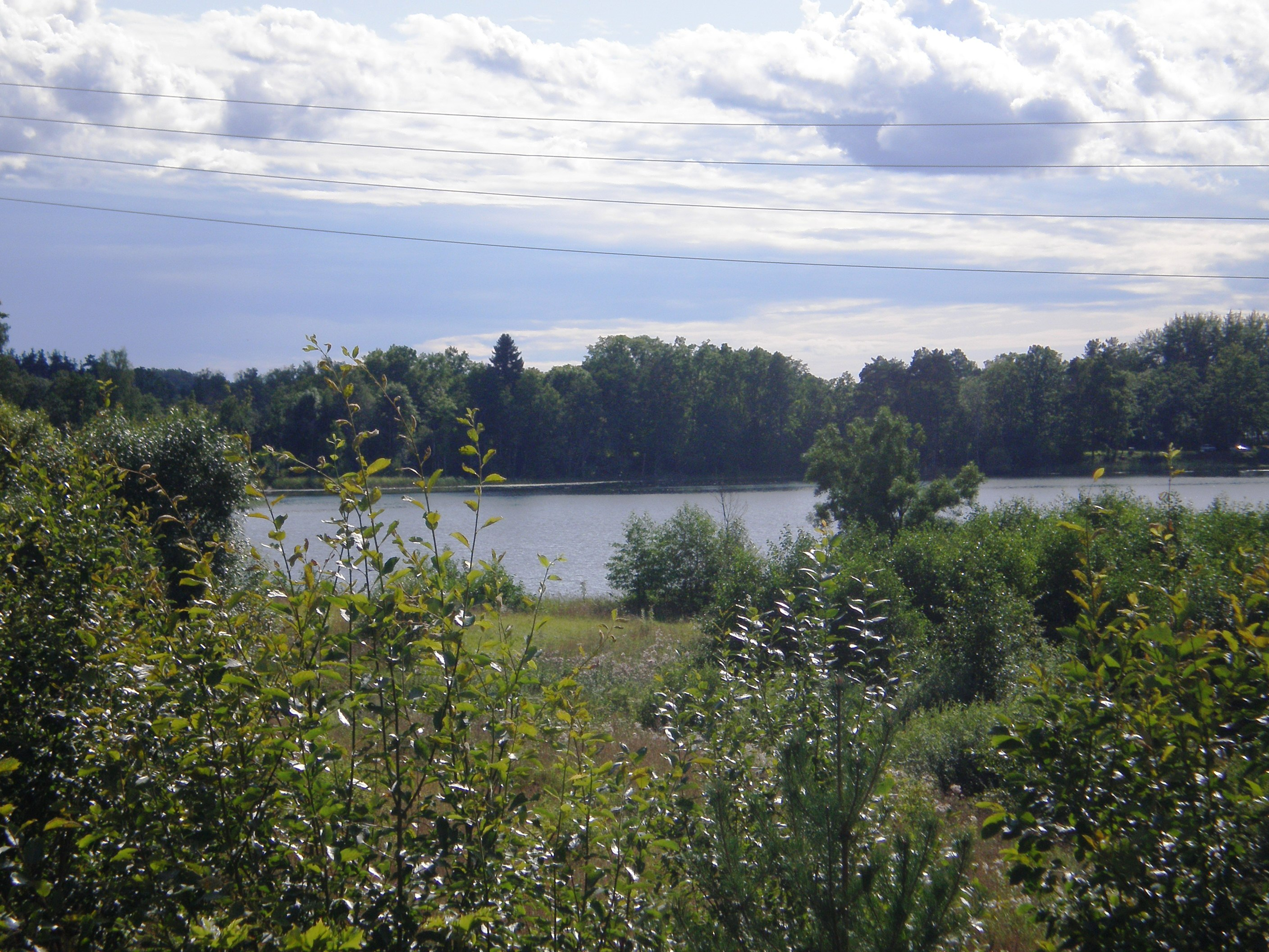 Meduma ezers, Daugavpils raj., Latvija